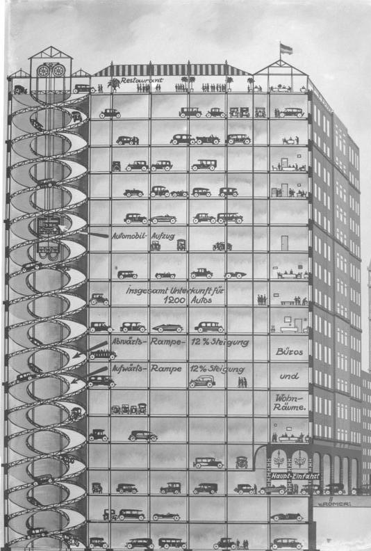 Ein interessantes Projekt eines Automobilhotels in Berlin! Das Projekt stammt von dem deutschen Ingenieur von Römer. In Fahrstühlen und durch Spiralrampen erfolgt die Auffahrt der Automobile in die einzelnen Stockwerke. Die Büro-, Wohn- und Unterhaltungsräume für die Besitzer der Wagen schliessen sich gleichzeitig an das Hotel an.